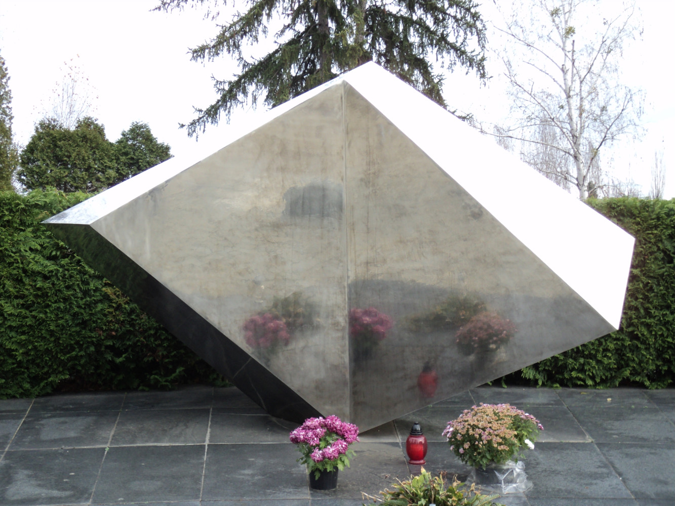 Spomenik žrtvama željezničke nesreće u Zagrebu 1975. godine